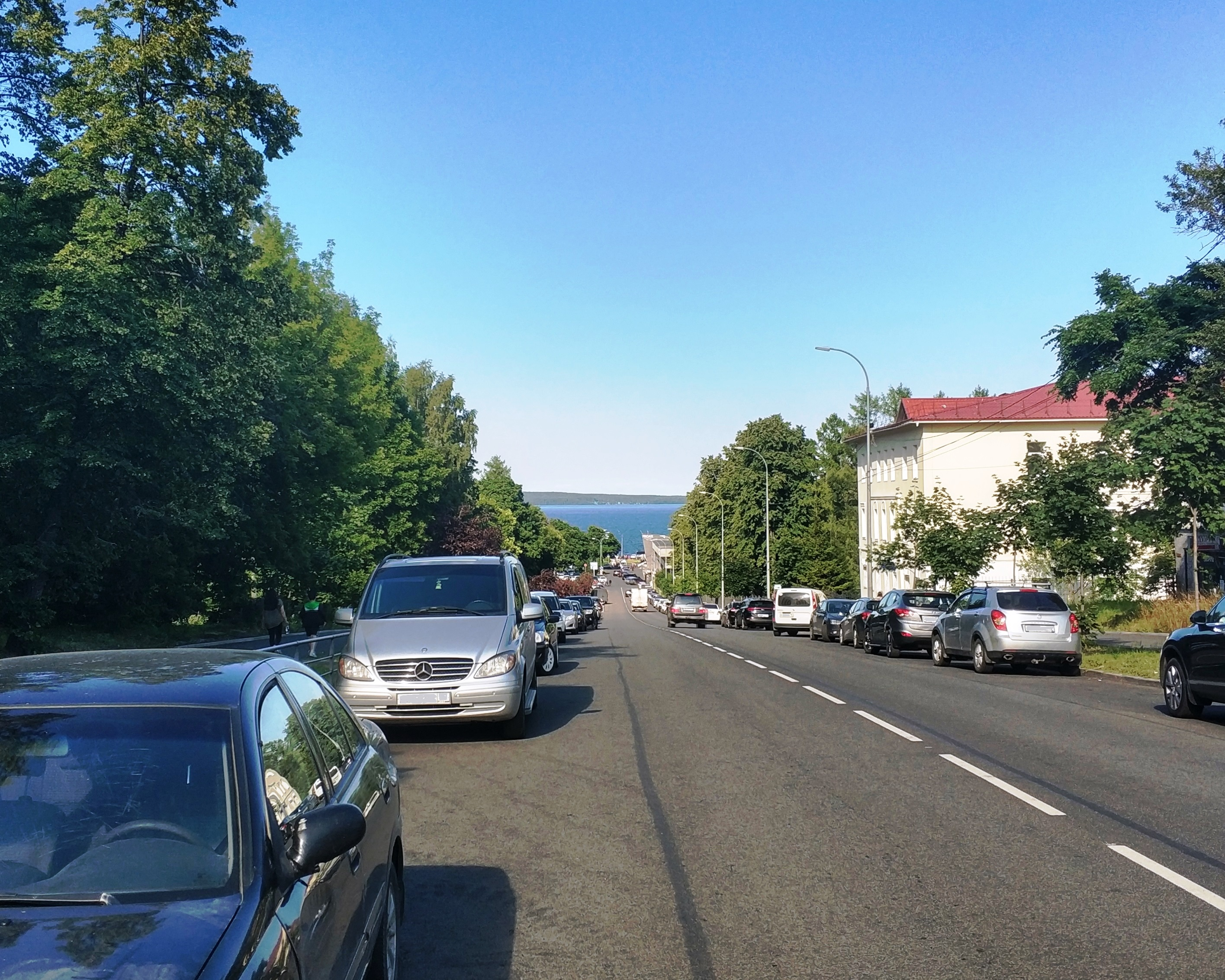 Проспект Карла Маркса в Петрозаводске. Вид на Онежскую набережную.